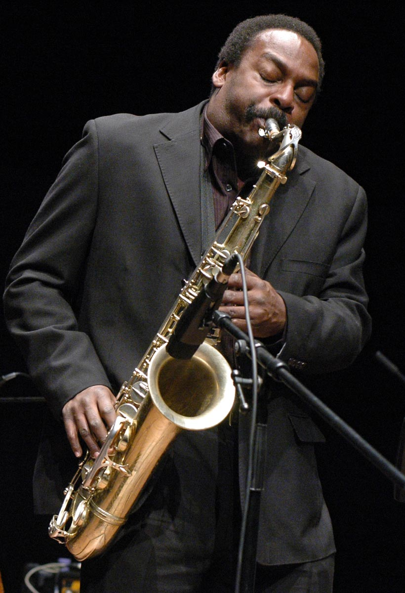 David Murray, Lange Nacht des Jazz im Radialsystem V, Berlin, Germany, eine Veranstaltung der Jazzwerkstatt Berlin-Brandenburg e.V.